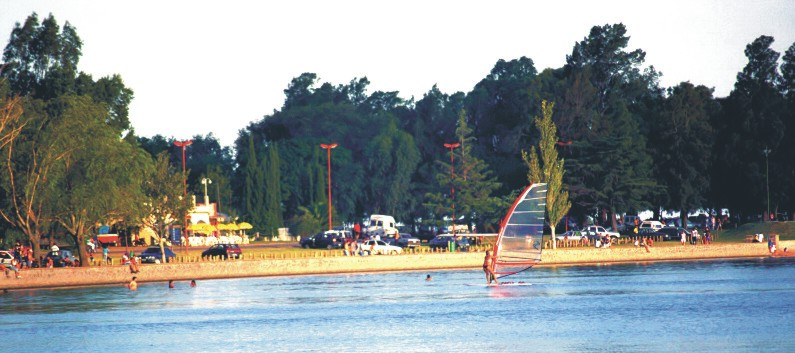 Windsurf en el Parque Natural Laguna de Gómez, en Junín, Argentina. (Autor: Germán Ramos).